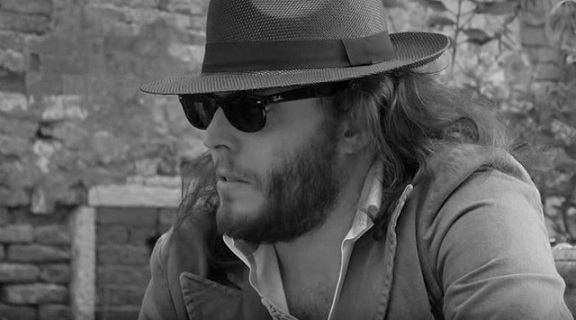 Daniele Bongiovanni intervistato durante la 57. Esposizione Internazionale d'Arte, La Biennale di Venezia (2017)